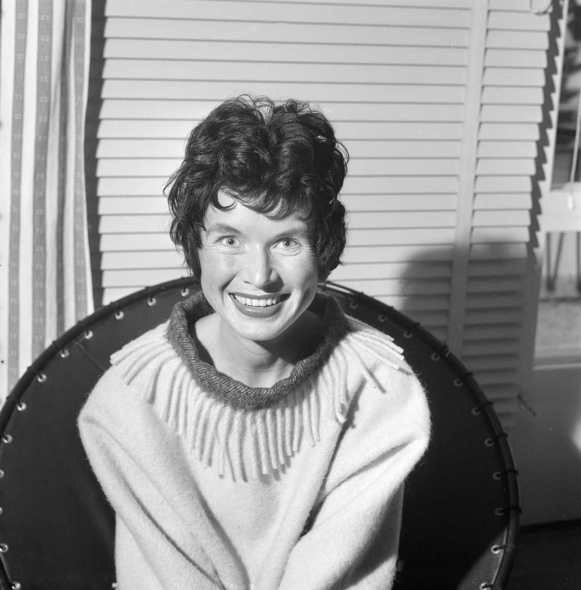 bolig, interiør, kvinne, journalist, mammaklær, moteklær. Rigmor Dahl Delphin (1908-1993) var ansatt som fotograf i ukebladet Alle Kvinner. Hennes negativarkiv ble i 2005 overført Oslo Bymuseum fra Gyldendal Norsk Forlag som var utgiver av bladet.